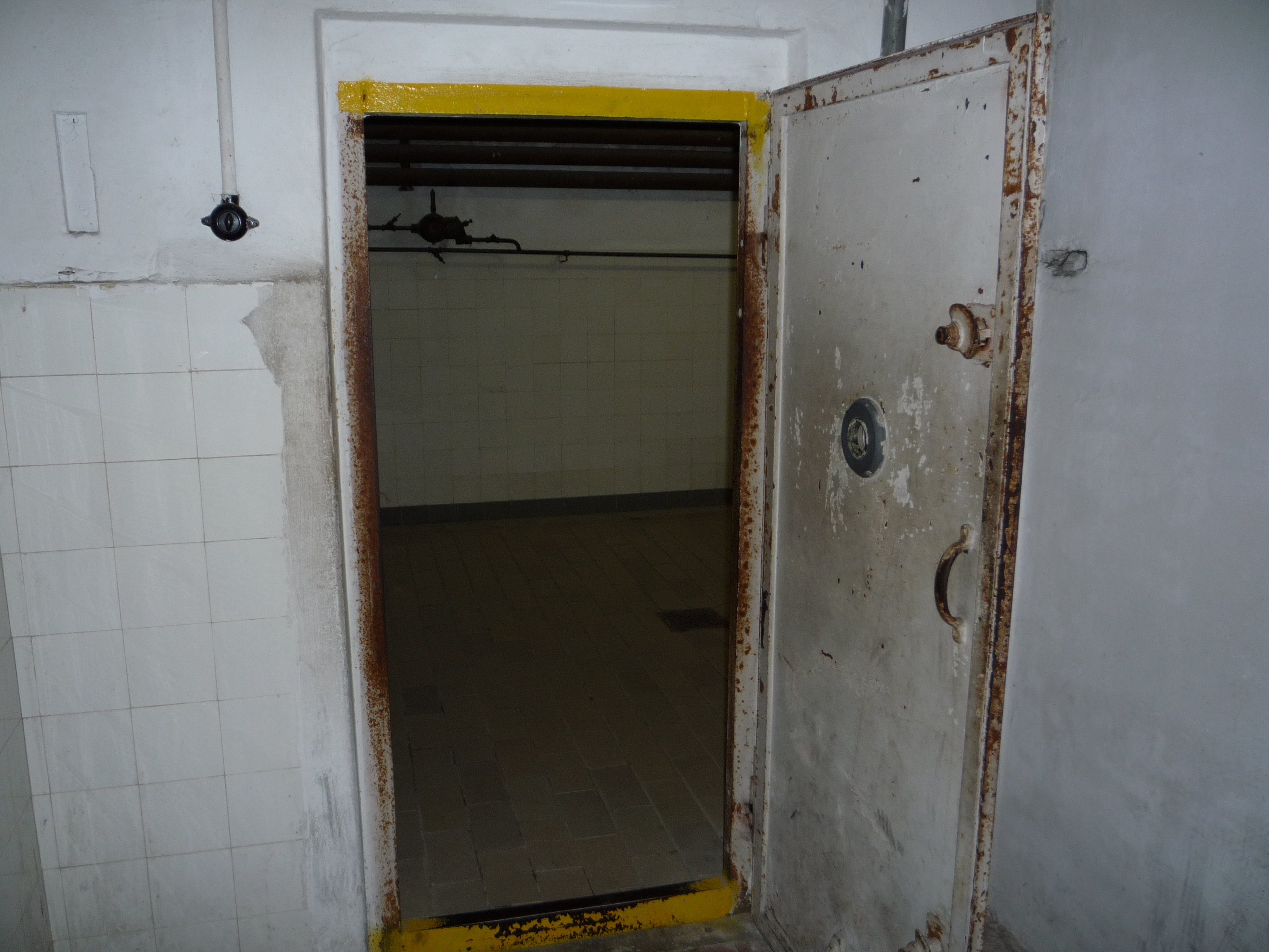 Autre porte de la chambre à gaz du camp de concentration de Mauthausen